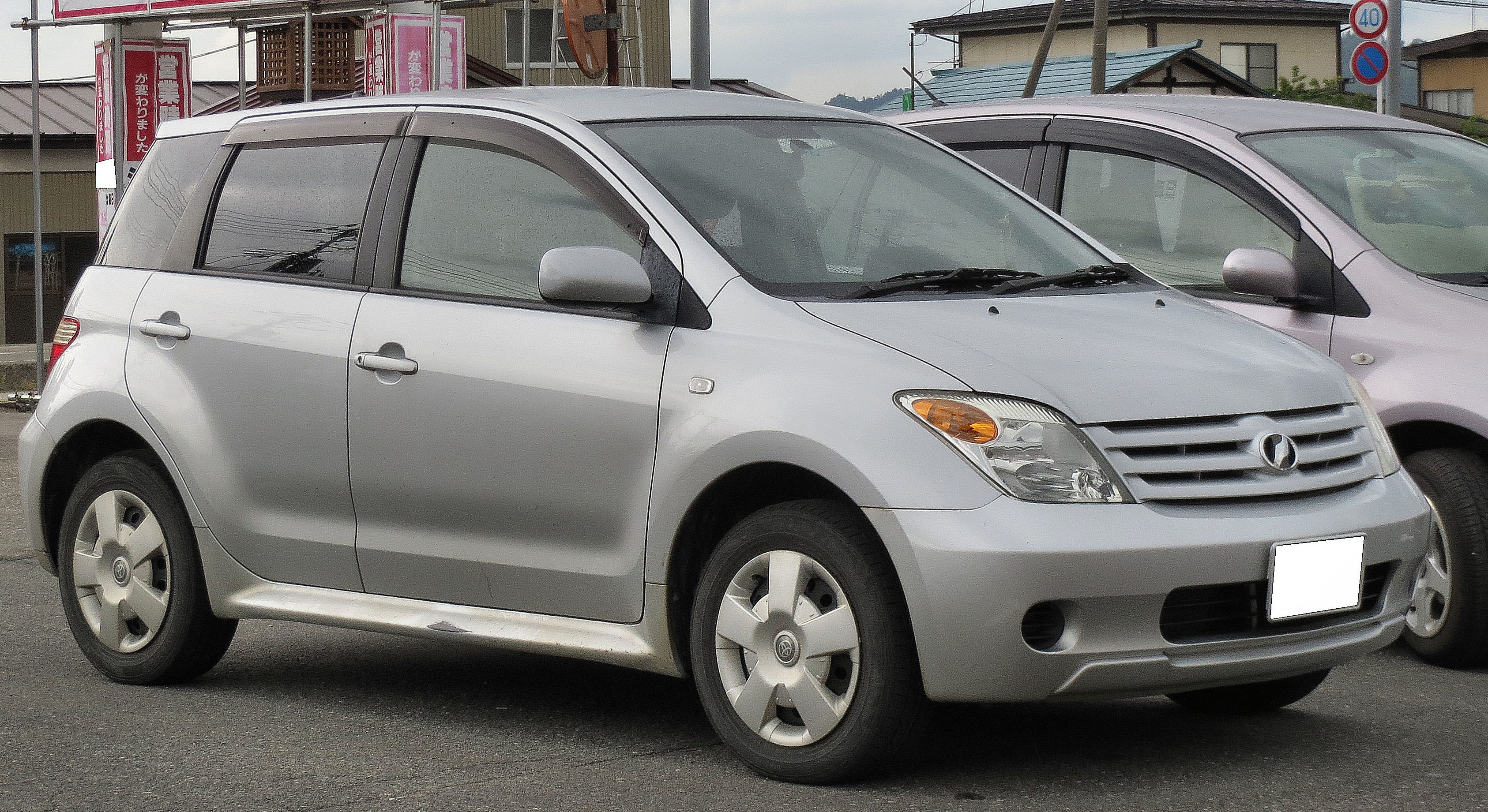 トヨタ ist 後期型